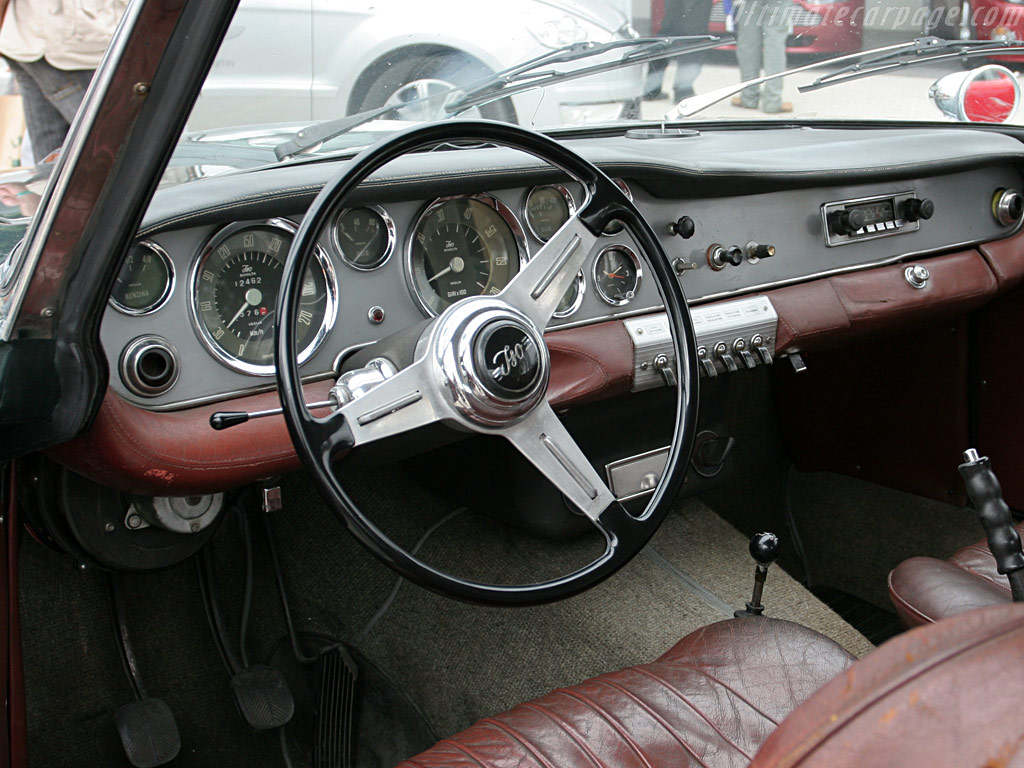 Iso Rivolta GT 300 - Interni